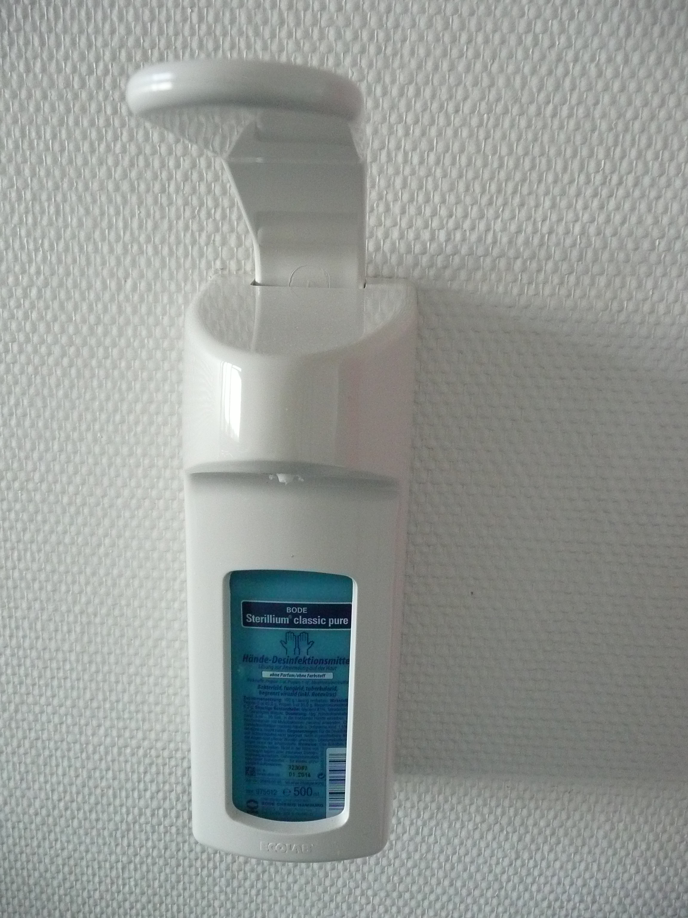 Handspender mit Desinfektionsmittel "Sterilium classic pure"